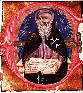 Inicial miniada de la Grant crónica de España de Juan Fernández de Heredia (r. 1376–1396) que representa al propio Juan Fernández de Heredia.